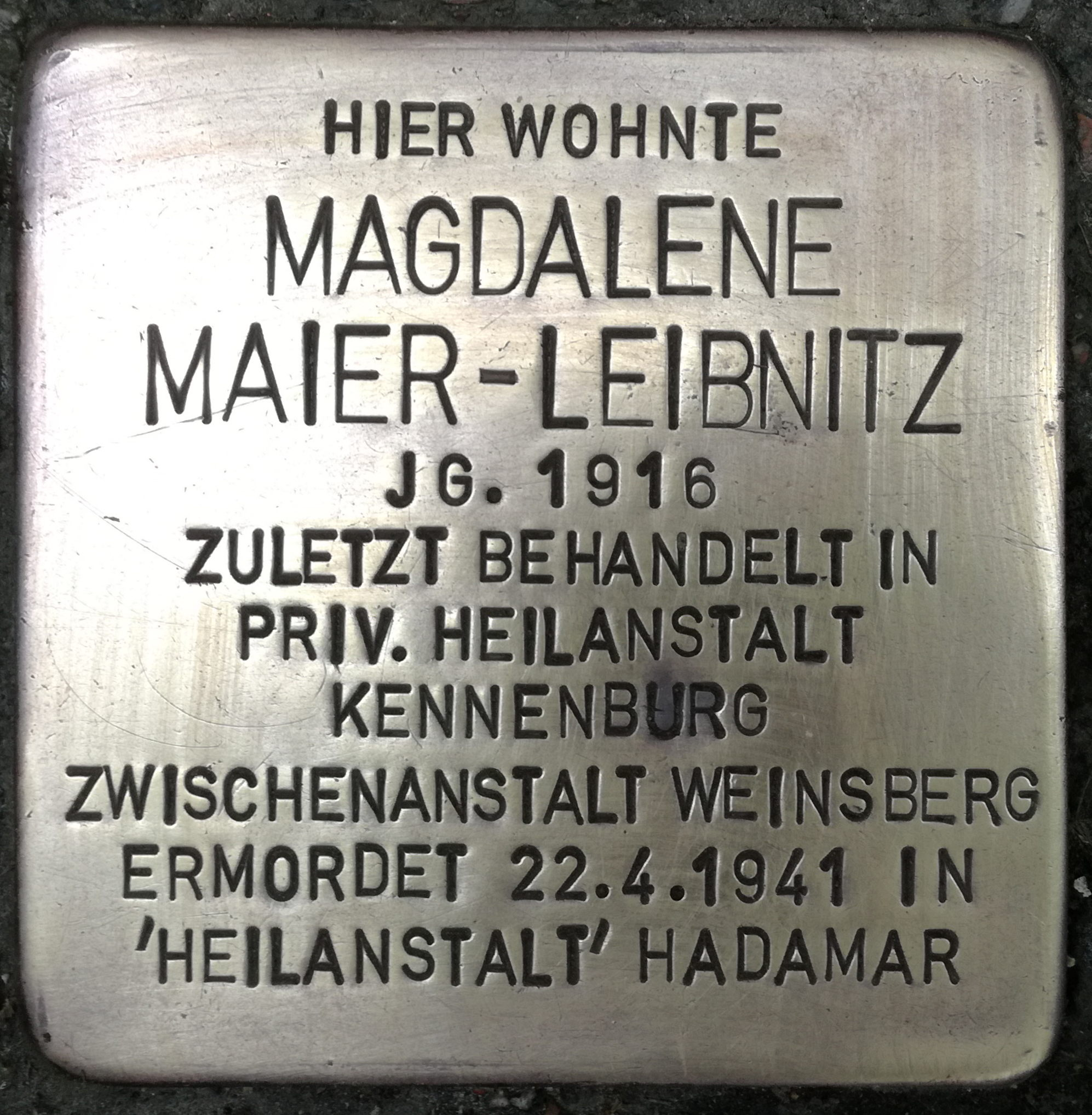 Hier wohnte Magdalene Maier-Leibnitz Jahrgang 1916 zuletzt behandelt in privater Heilanstalt Kennenburg Zwischenanstalt Weinsberg ermordet 22.4.1941 in 'Heilanstalt' Hadamar